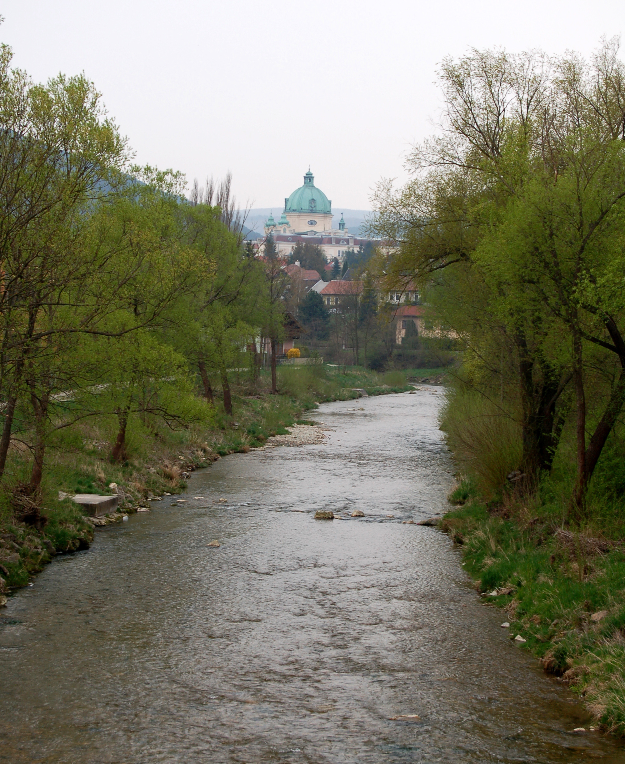 Kuppel der Margarethenkirche in Berndorf über dem Fluss Triesting